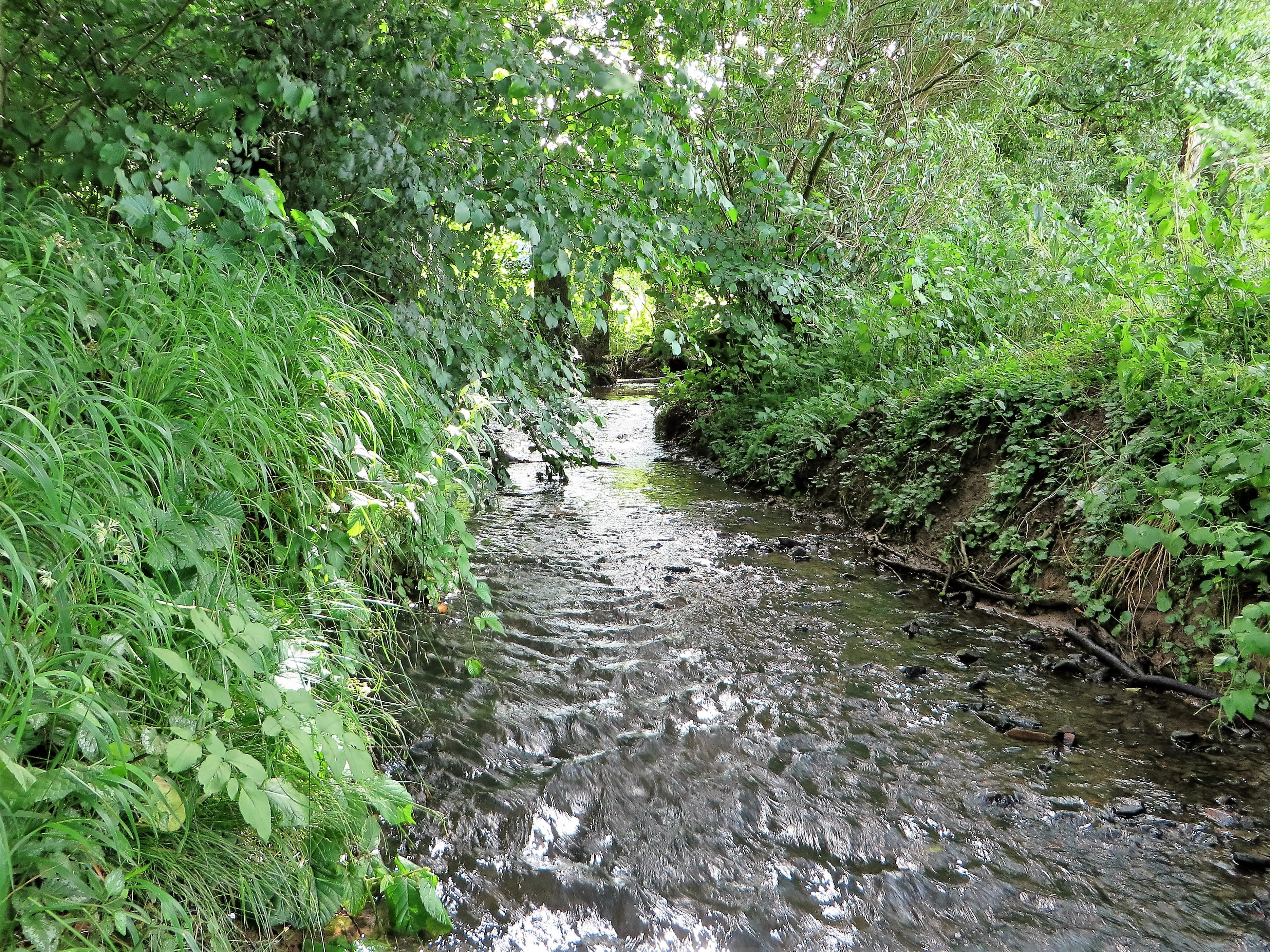 Der Wannebach im Naturschutzgebiet „NSG-Oberes Wannebachtal“ im Hagener Stadtteil Berchum, Höhe Tiefendorfer Straße am Zufluss des Elsebachs. Der Wannebach hat eine Länge von 6 km und entspringt in der Schälker Heide auf Letmather Gebiet, fließt anschließend durch Oberes und Unteres Wannebachtal und mündet an der Lenneaue Berchum in die Lenne.